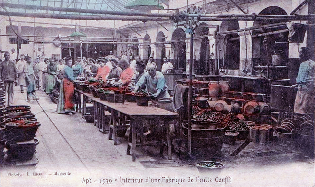 Mise en toupin de terre cuite des cerises